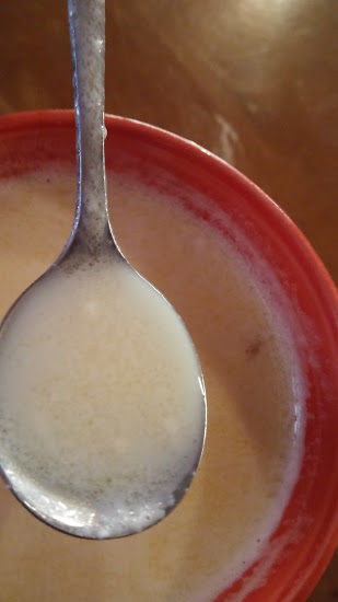 Got de llet de iac amb mel, servit en un restaurant de Zhongdian.